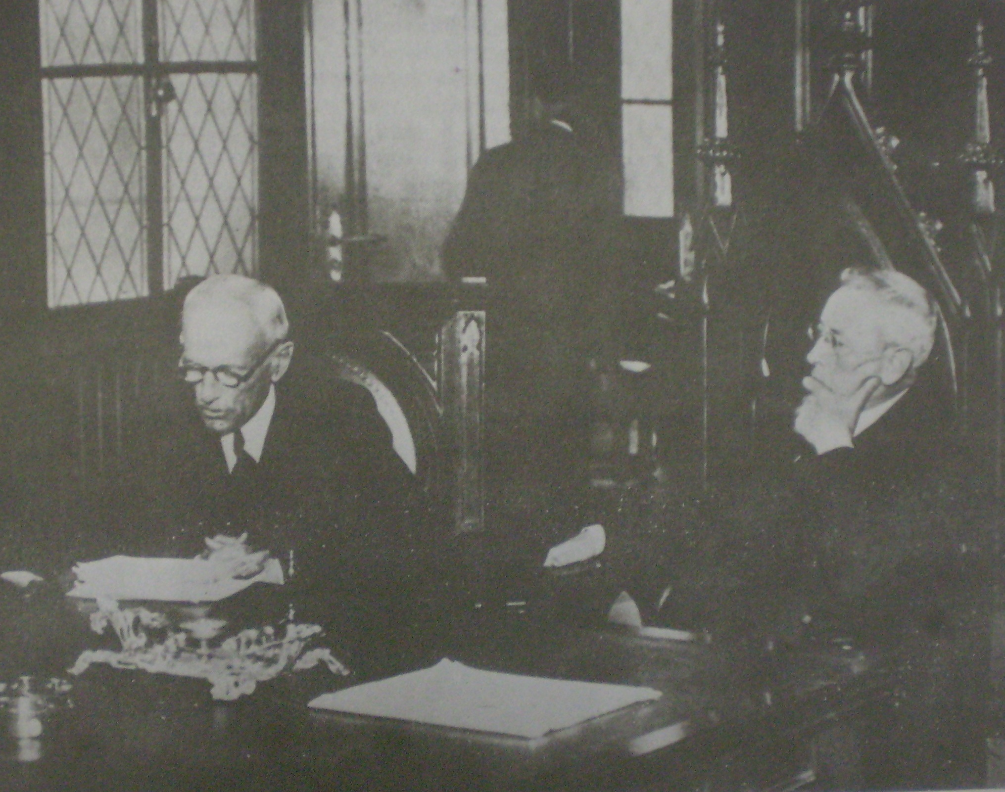 José Nicolas Matienzo y Ernesto Bosch